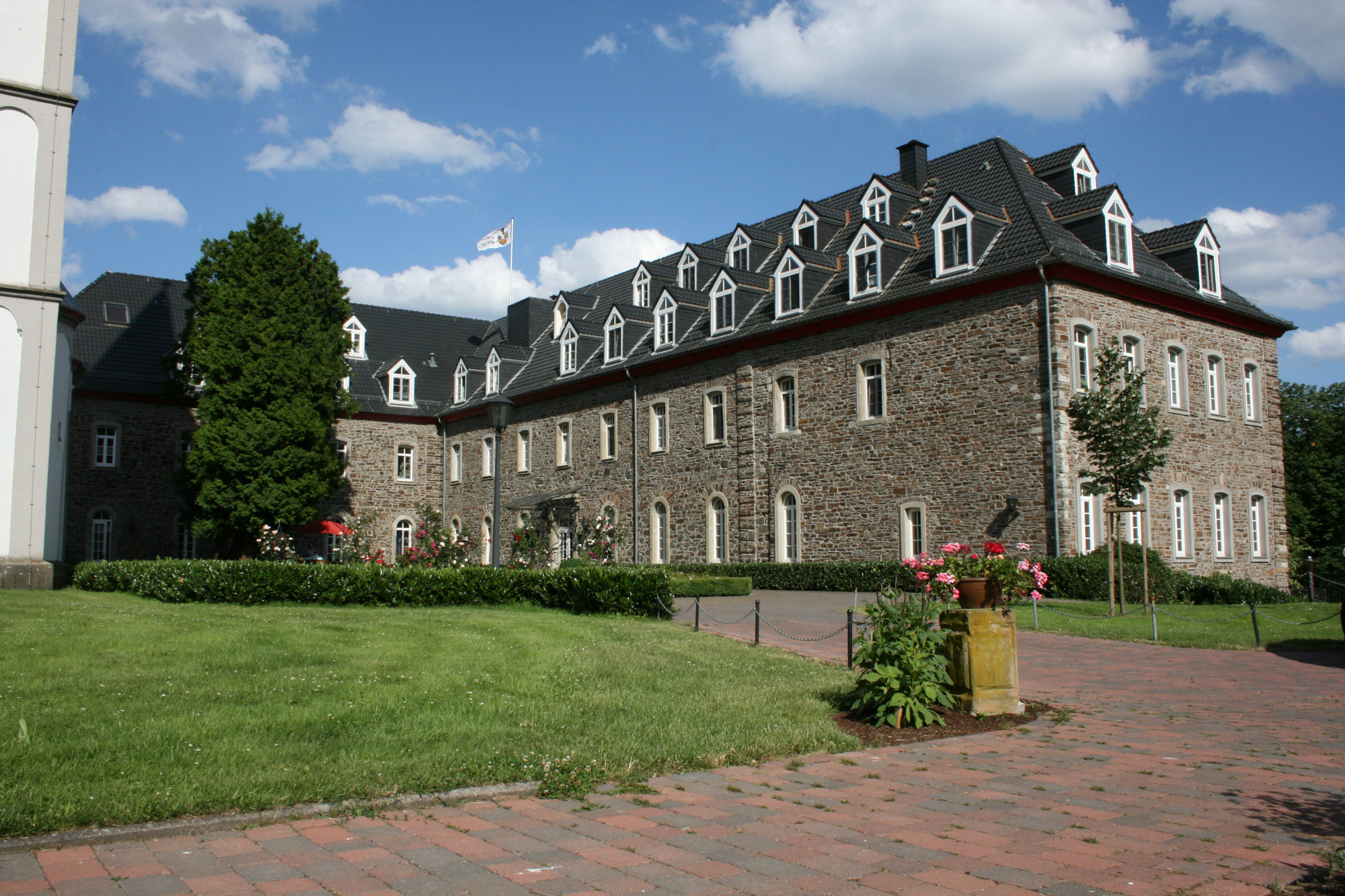 Schloss Merten, Eitorf